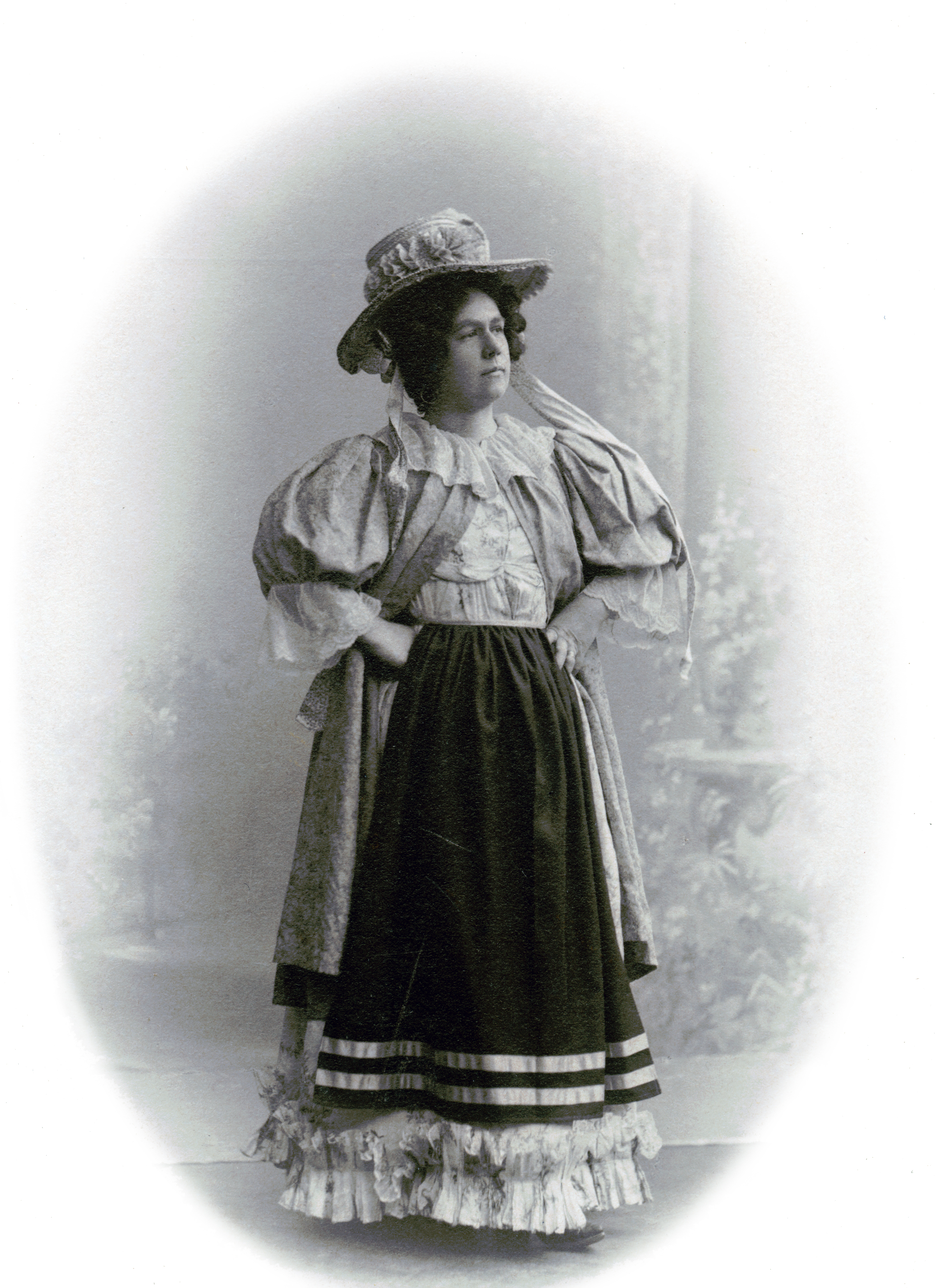 Emma Wahlbom (f. Becker), skådespelare vid Albert Ranfts sällskap 1900-01